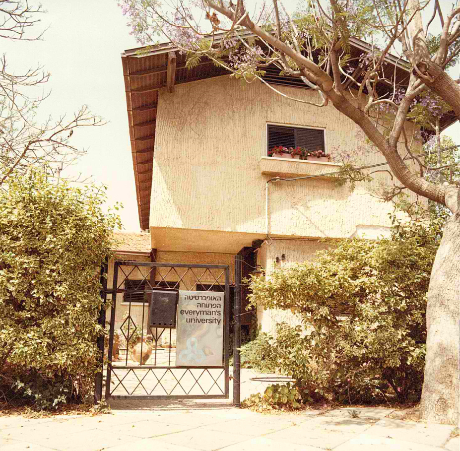 הוילה באפקה שבה שכנו משרדי האוניברסיטה הפתוחה בתחילת דרכה 1974